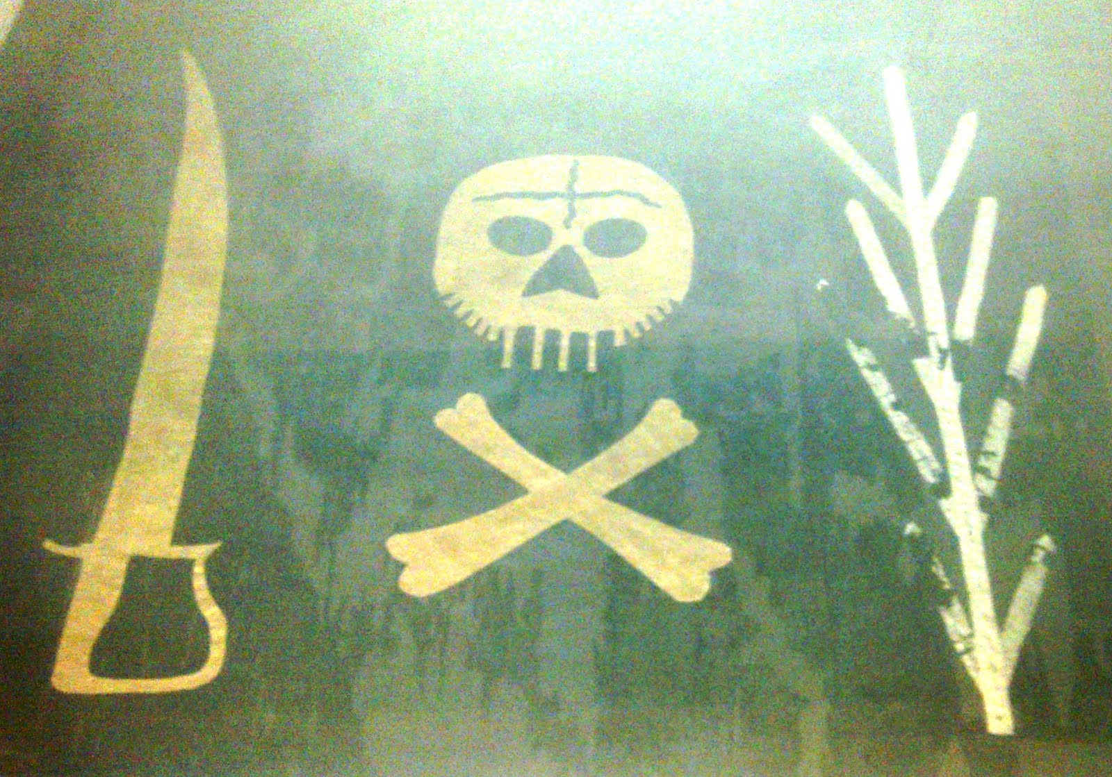 Bandera del célebre general carlista Ramón Cabrera, apodado el tigre del Maestrazgo (1806-1877), de Tortosa, que conquistó Morella, Cantavieja y el Maestrazgo. Se conserva en el Museo del Ejército de Madrid.